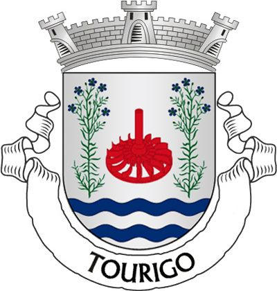 Brasão da freguesia do Tourigo